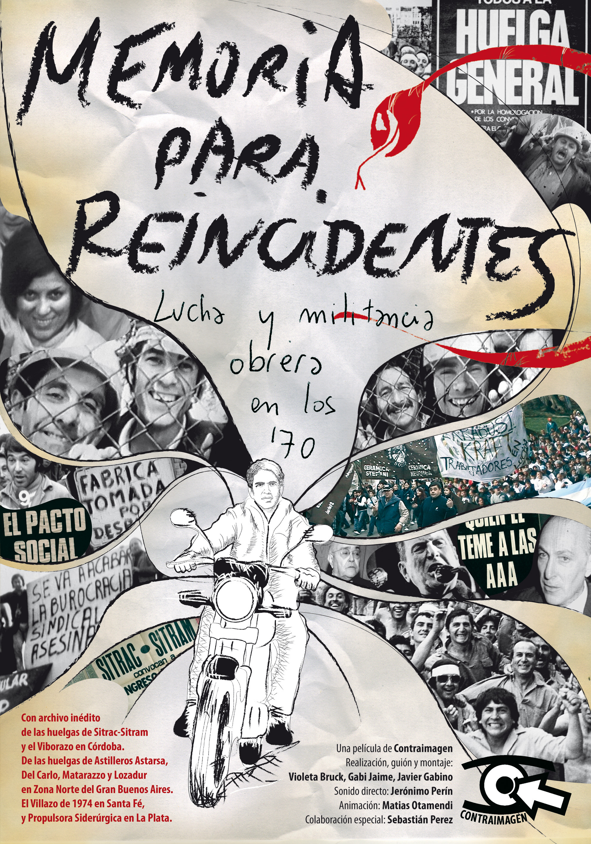 Afiche oficial de la película documental "Memoria para reincidentes", que trata sobre la lucha y la militancia obrera en Argentina durante la década del 70.